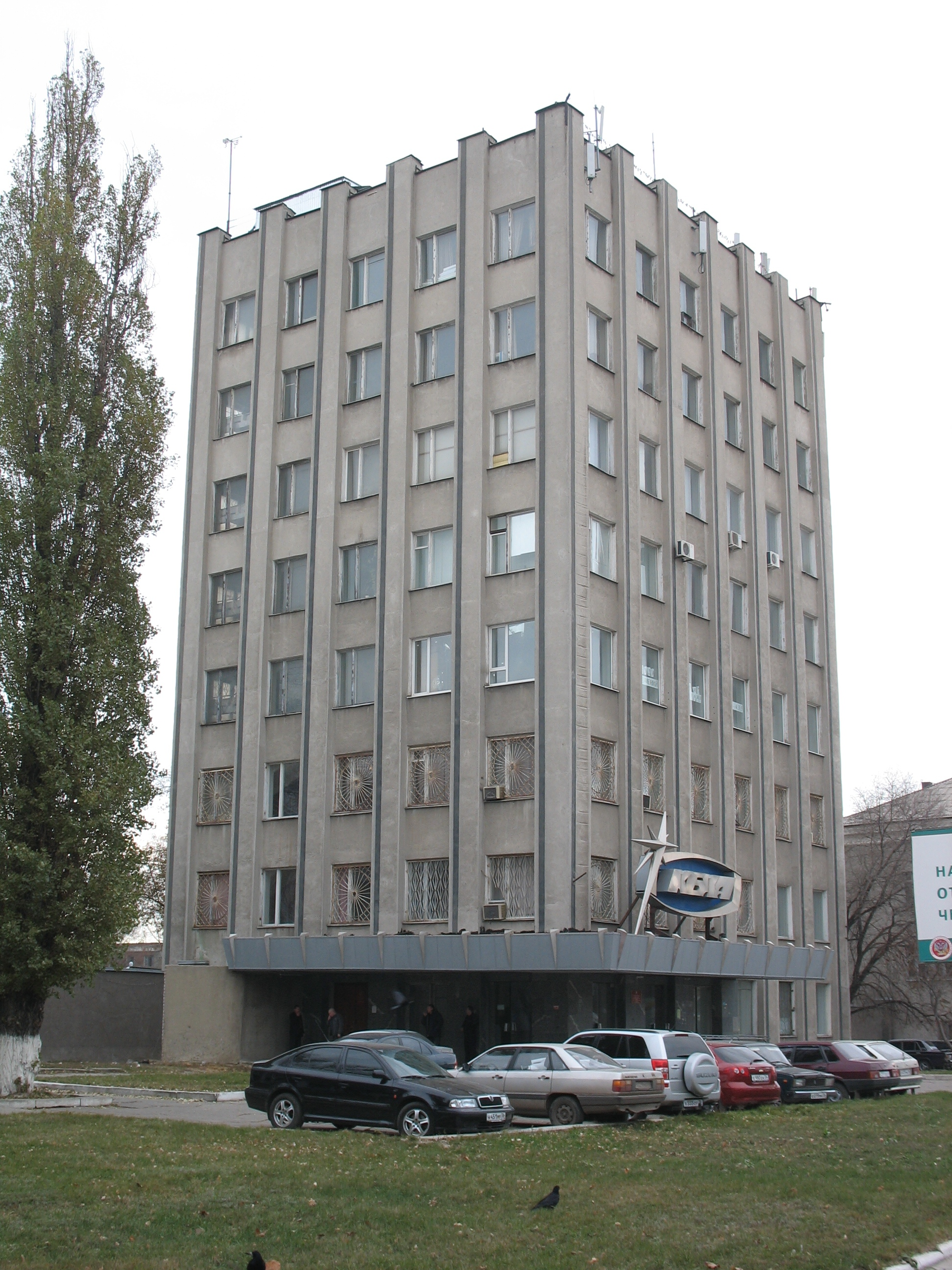 Воронеж, КБХА